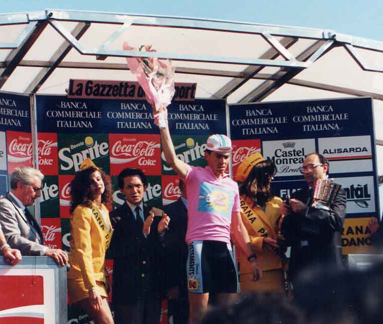 Philippe Casado vine la tappa di Olbia del Giro d'Italia 1991